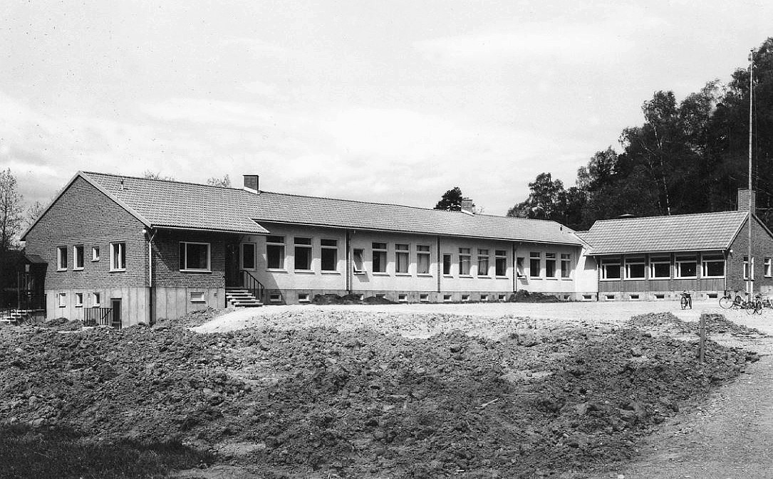 Vistaskolans första byggnad, arkitekt Karl W. Ottesen